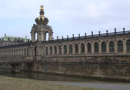 Zwinger Dresden